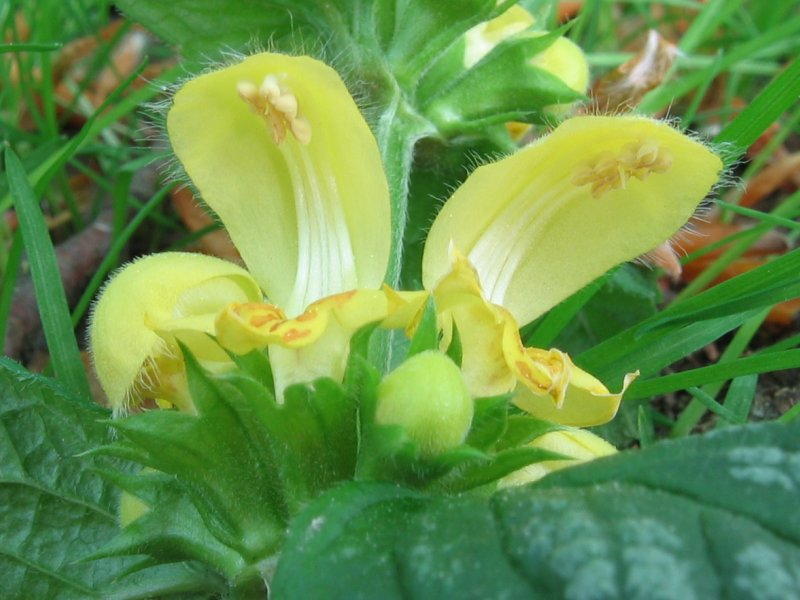 Gelbe Taubnessel Galeobdolon luteum, Nähe Rostock